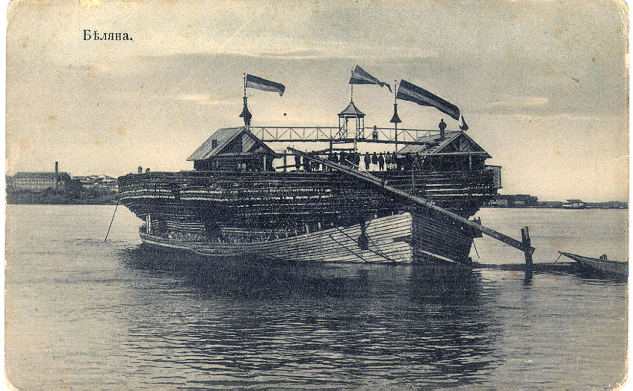 Почтовая открытка с изображением беляны